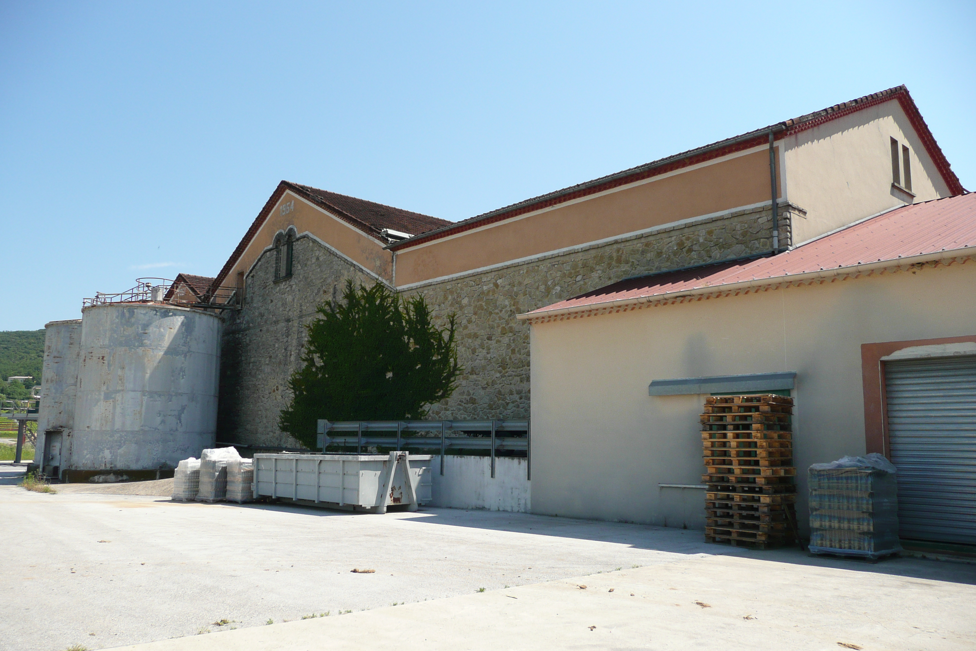 Cave des vignerons à Saint-Gély-du-Fesc (Hérault).